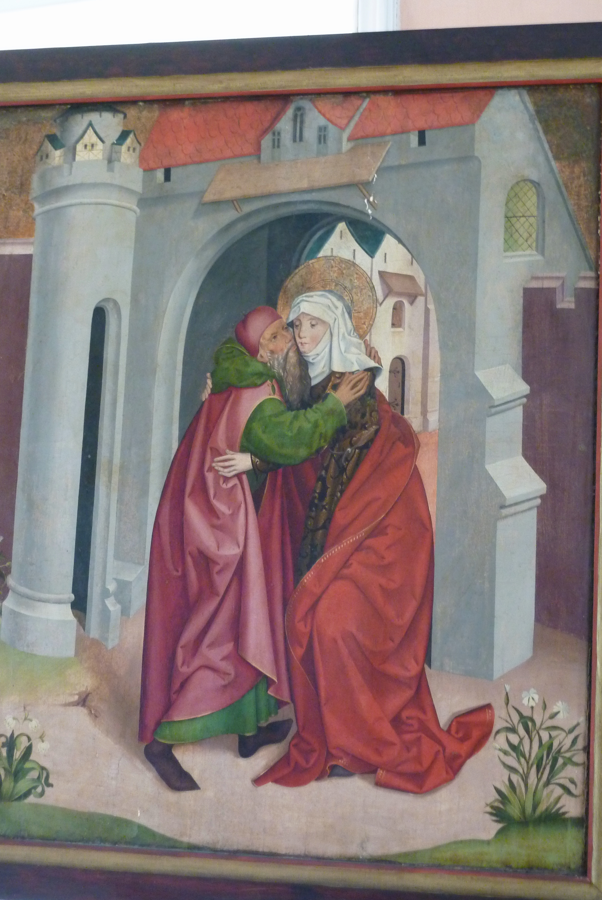 Lauterbacher Marienaltar, um 1480, im ehemaligen Stadtpalais Hohhaus (Hohhaus Museum) in Lauterbach (Hessen), zweiter Zustand (einmal geöffnete Flügel), Szenen aus dem Leben Marias, Darstellung: Anna und Joachim an der Goldenen Pforte